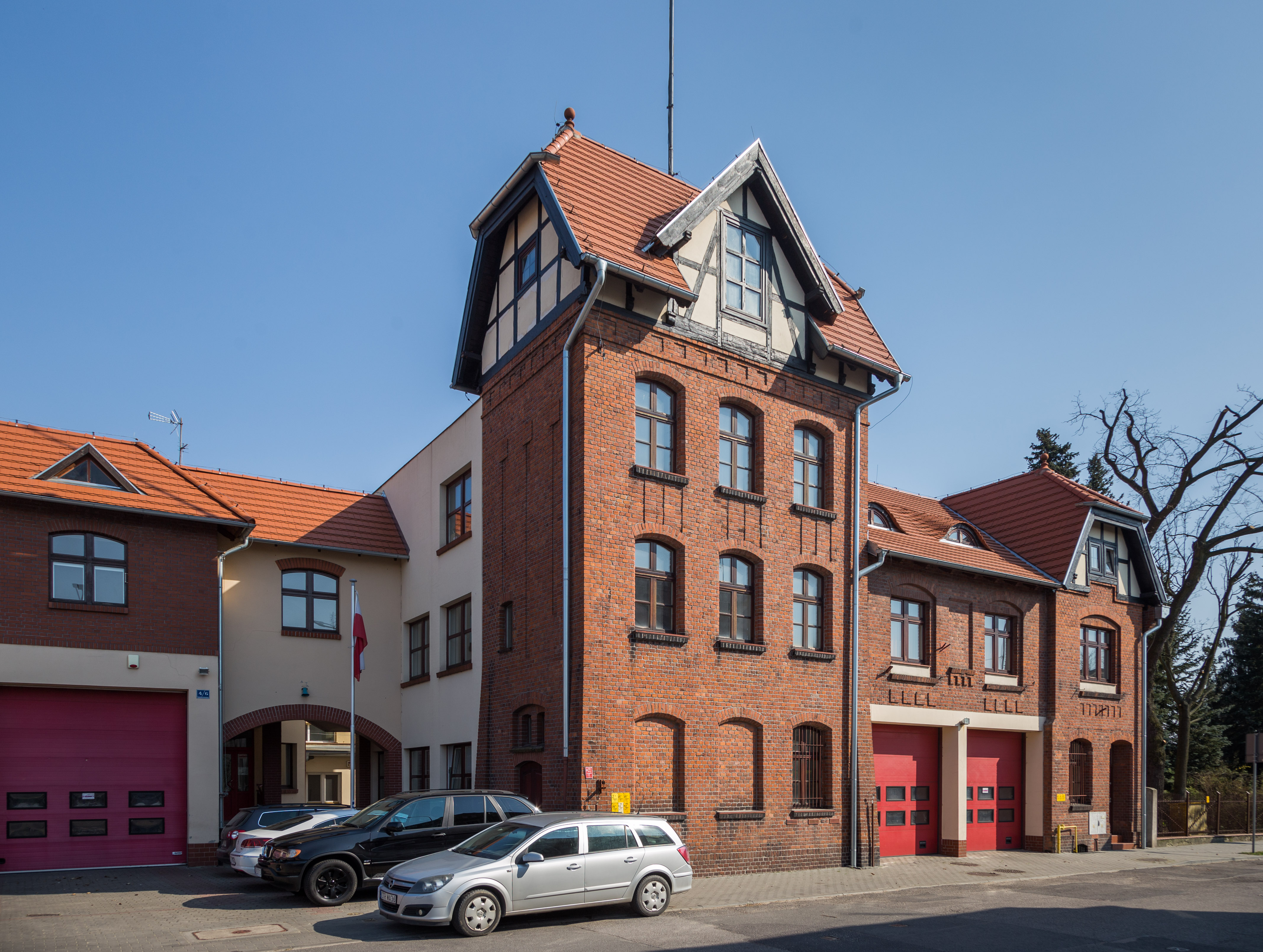 Budynek straży pożarnej przy ul. Paderewskiego 4 w Toruniu.